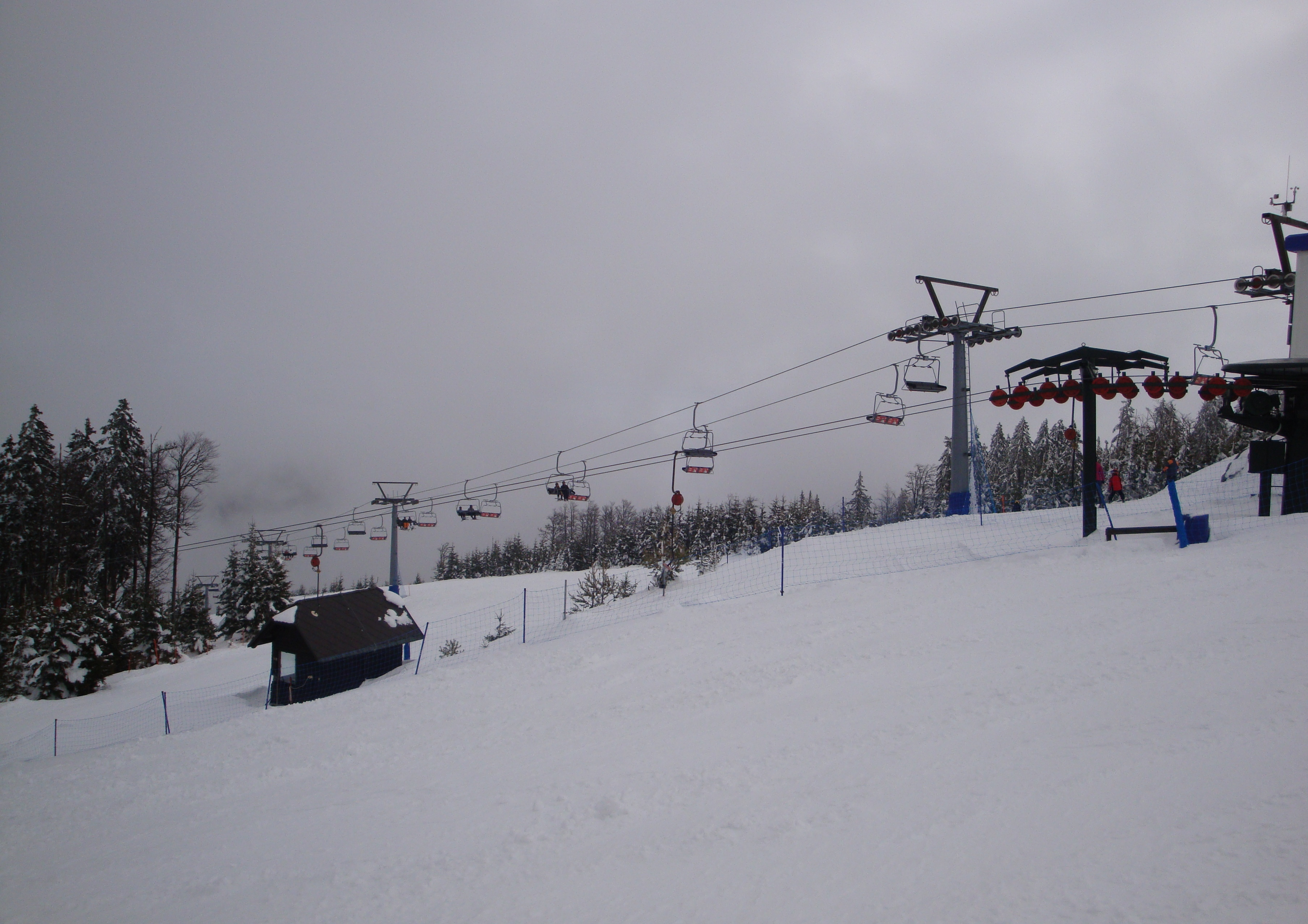 Jurgovo na Rogli, Zreško Pohorje, Slovenija.